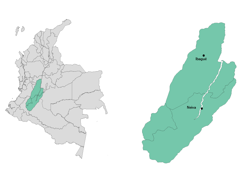 Eje musical Andino Centro-sur